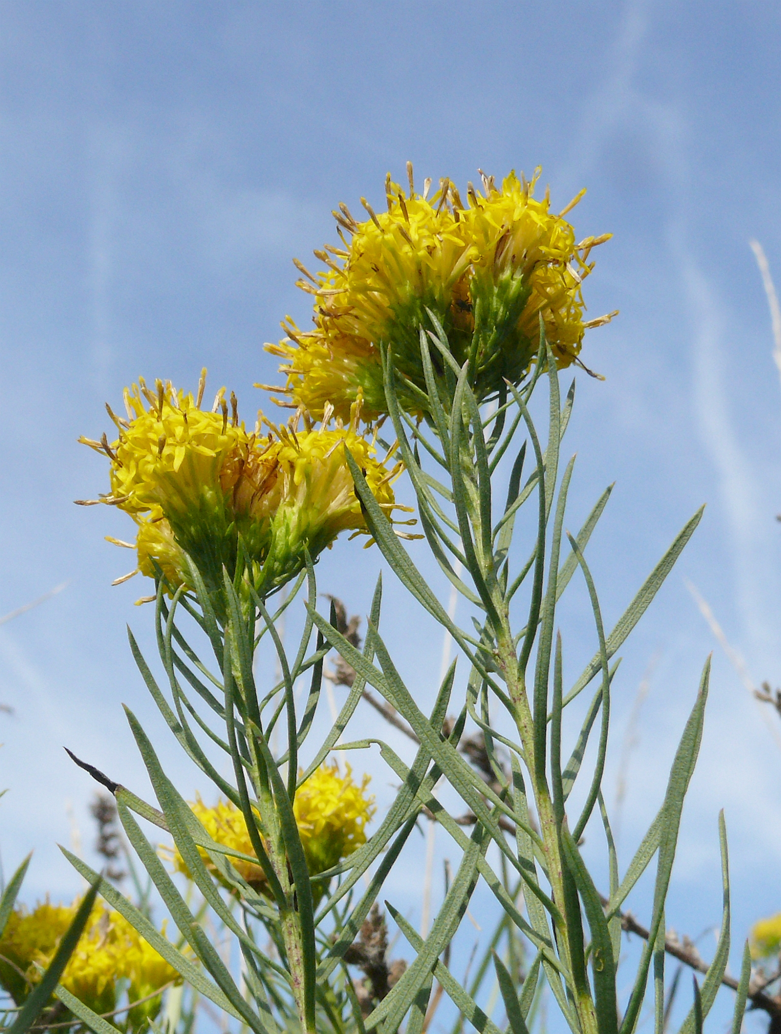 'Crinitaria linosyris, Tauberland, Deutschland